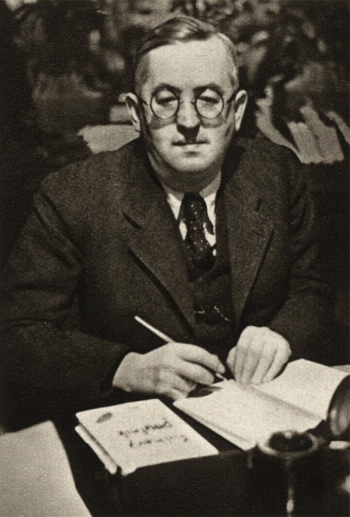 Josef Čapek 1937 (Pestrý týden)